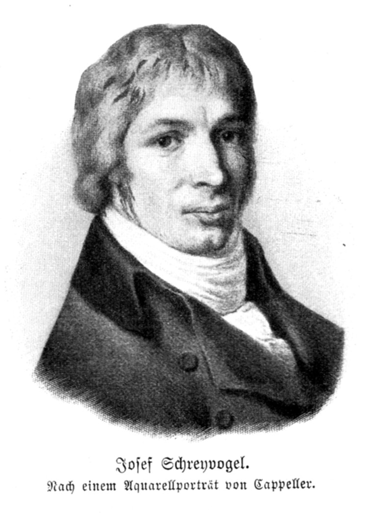 Josef Schreyvogel